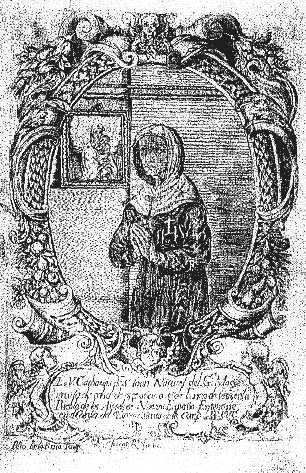 La V. Catharina de S. loan Natural del Gn. Mogol, 1690., en un grabado del siglo XVII